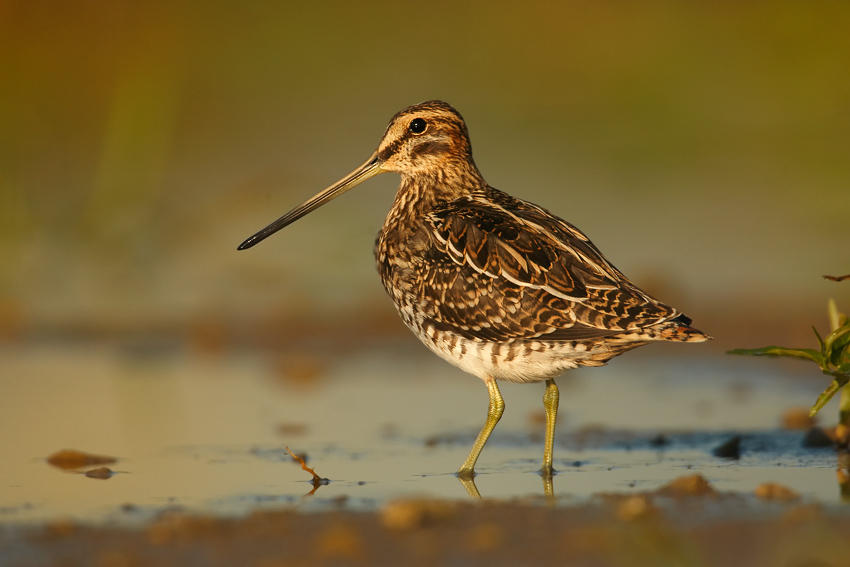 Gallinago gallinago, Olomoucko, CZ